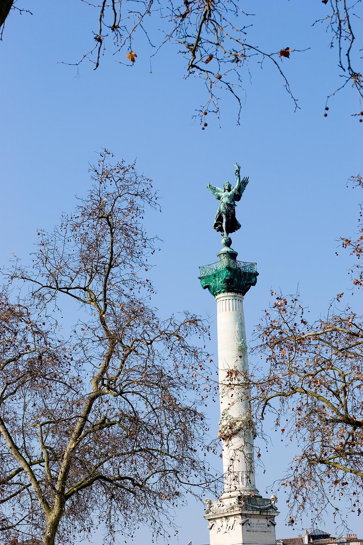 Colonne aux Girondins in Bordeaux, France.